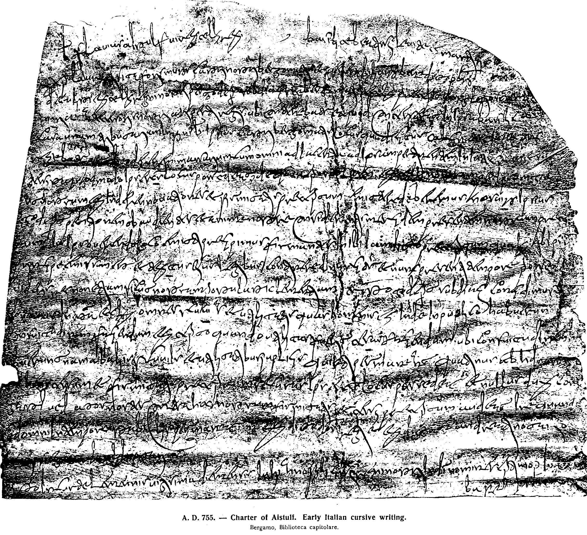 Diplom langobardského krále Aistulfa z roku 755.